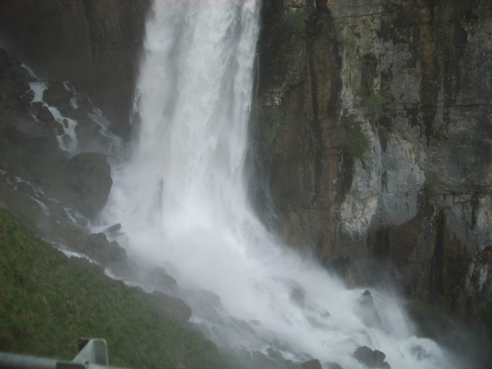 Rinquelle SG, Switzerland